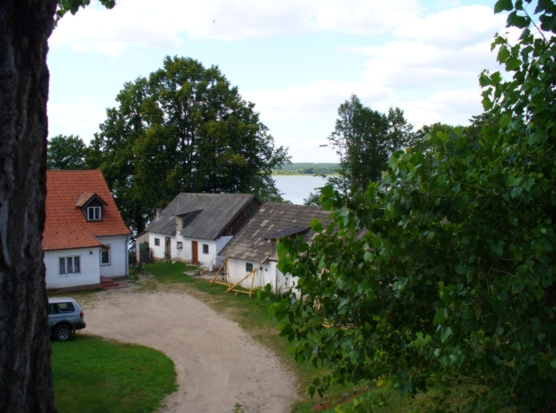 Jeziorowskie